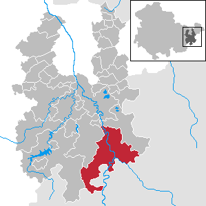 Greiz in Thuringia - District Greiz